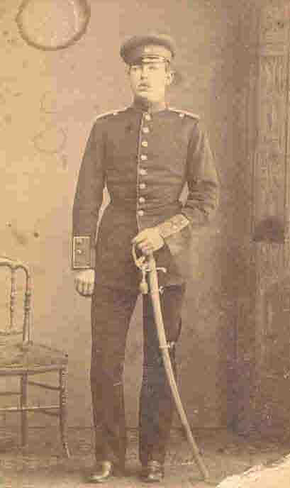 Walter Rogalla von Bieberstein (1851-1914), Member of Preussisches Herrenhaus